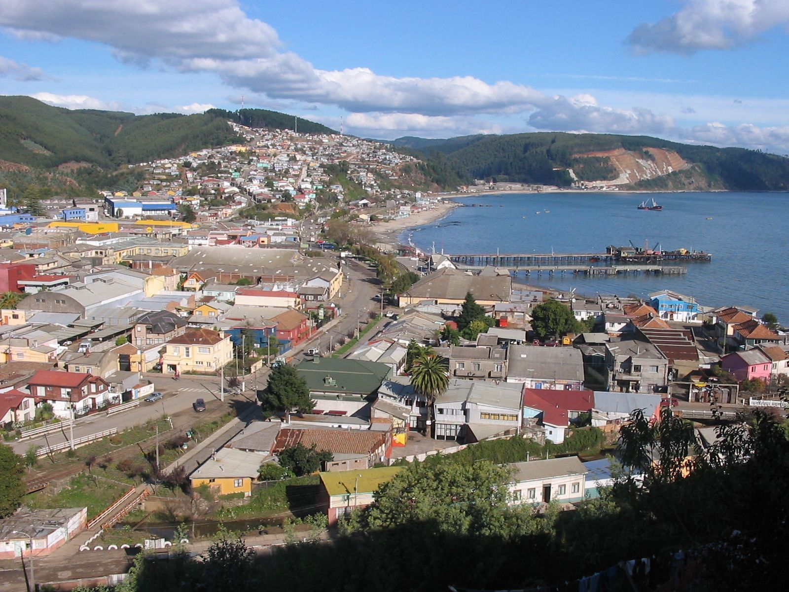 Fotografía panorámica de la ciudad de Tomé (Chile). Autor: Nello Rolleri